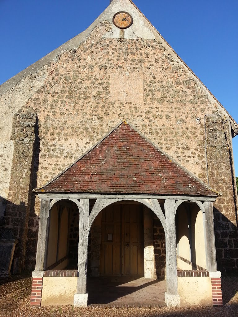 façade ouest de l’église Saint-Rémi, Vérigny, Eure-et-Loir, France.